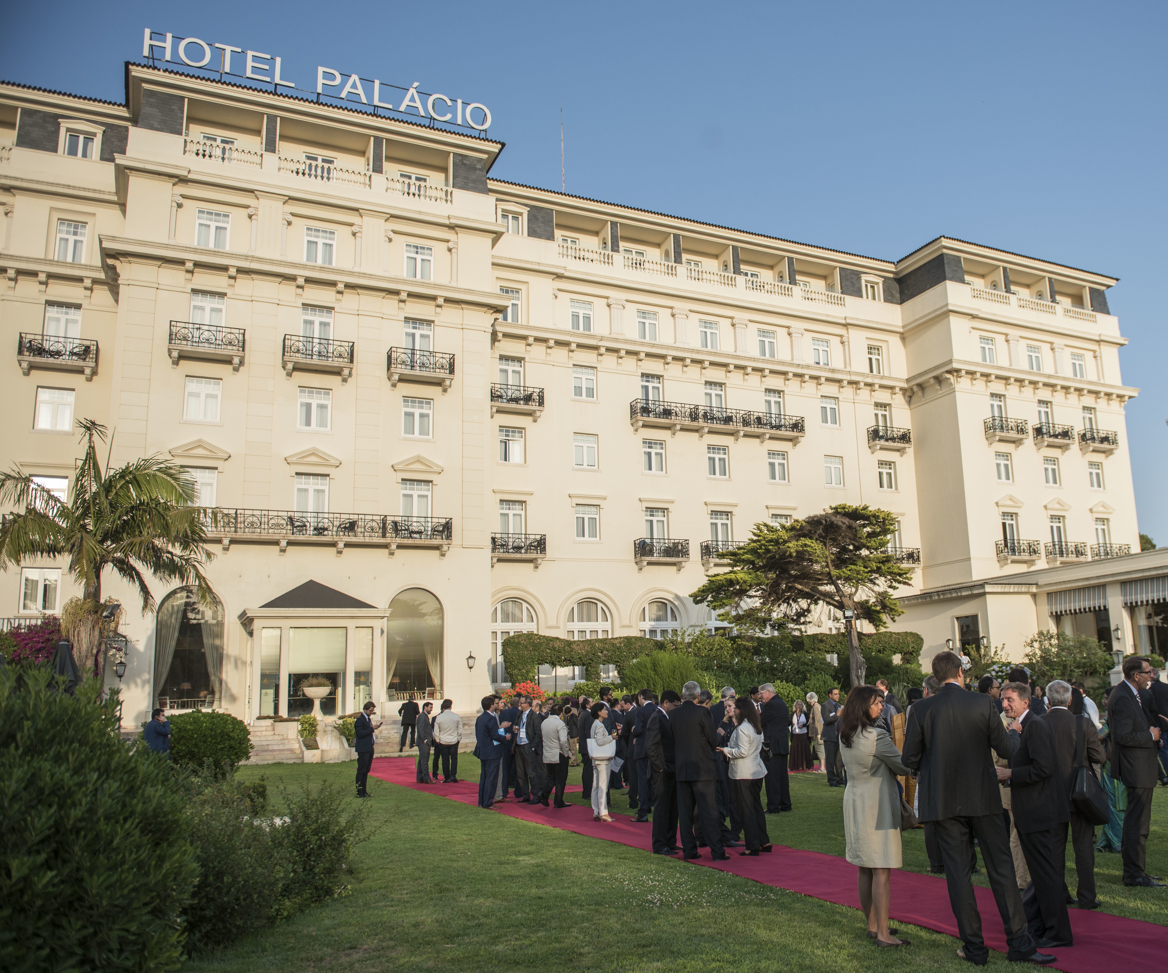 Horasis India Meeting, Cascais, Portugal, 3-4 July